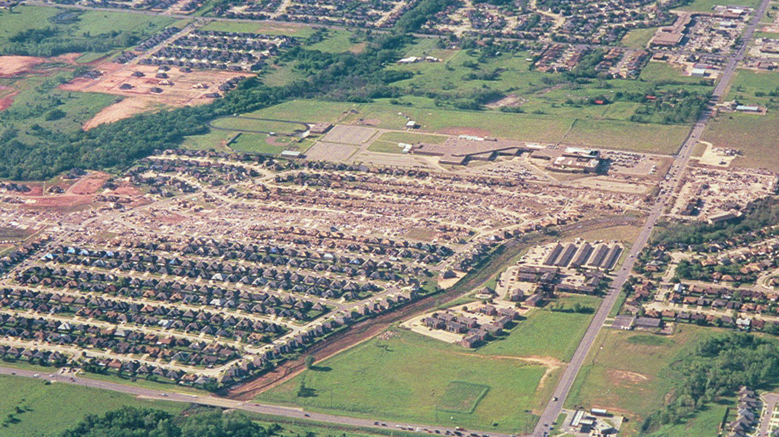 Moore, Oklahoma tornado damage, May 1999